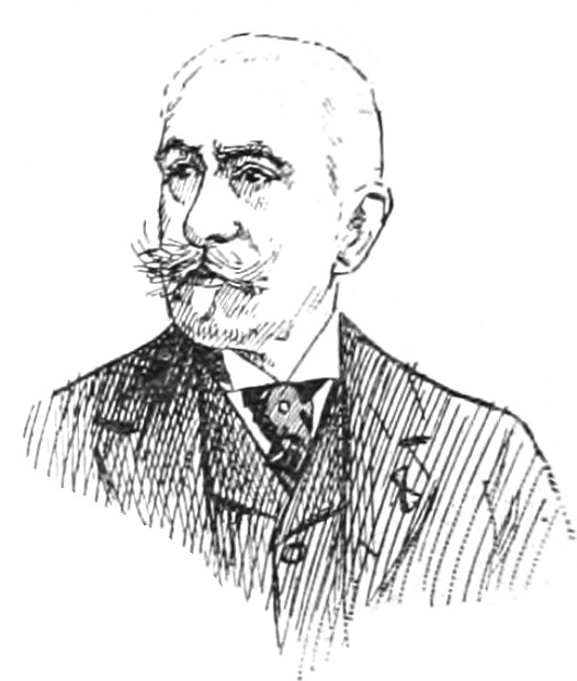 "La Nouvelle Chambre" : "Legrand".